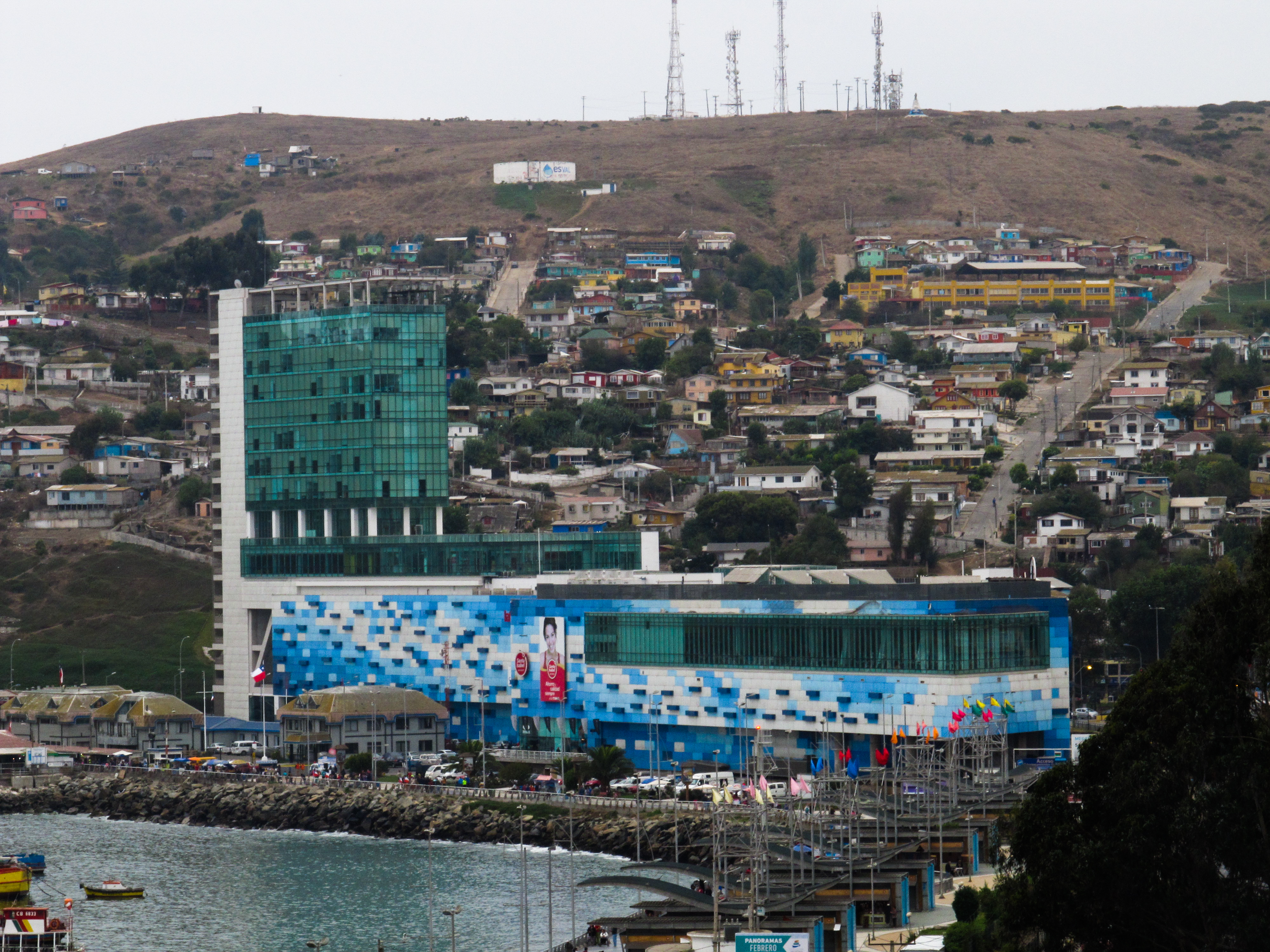 Mall Arauco San Antonio, San Antonio, Chile.